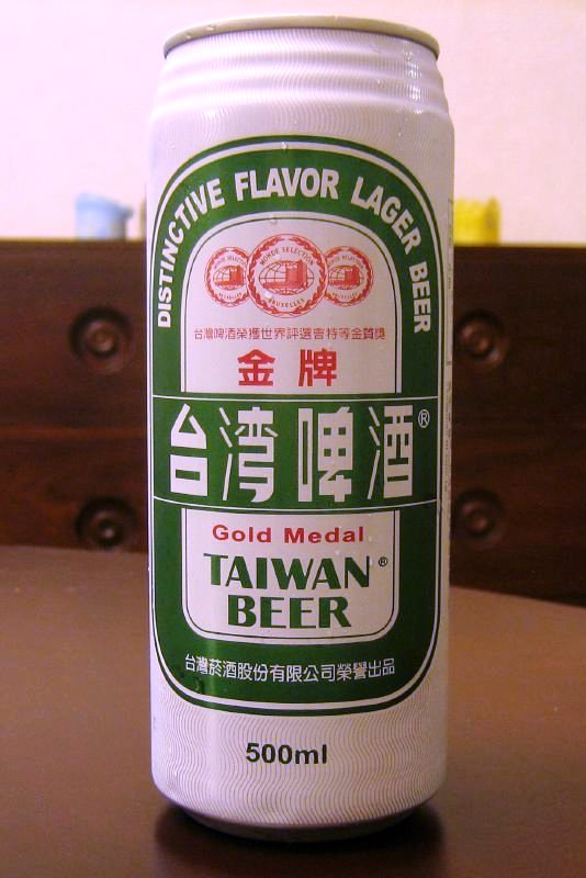 金牌台灣啤酒500毫升鋁罐。